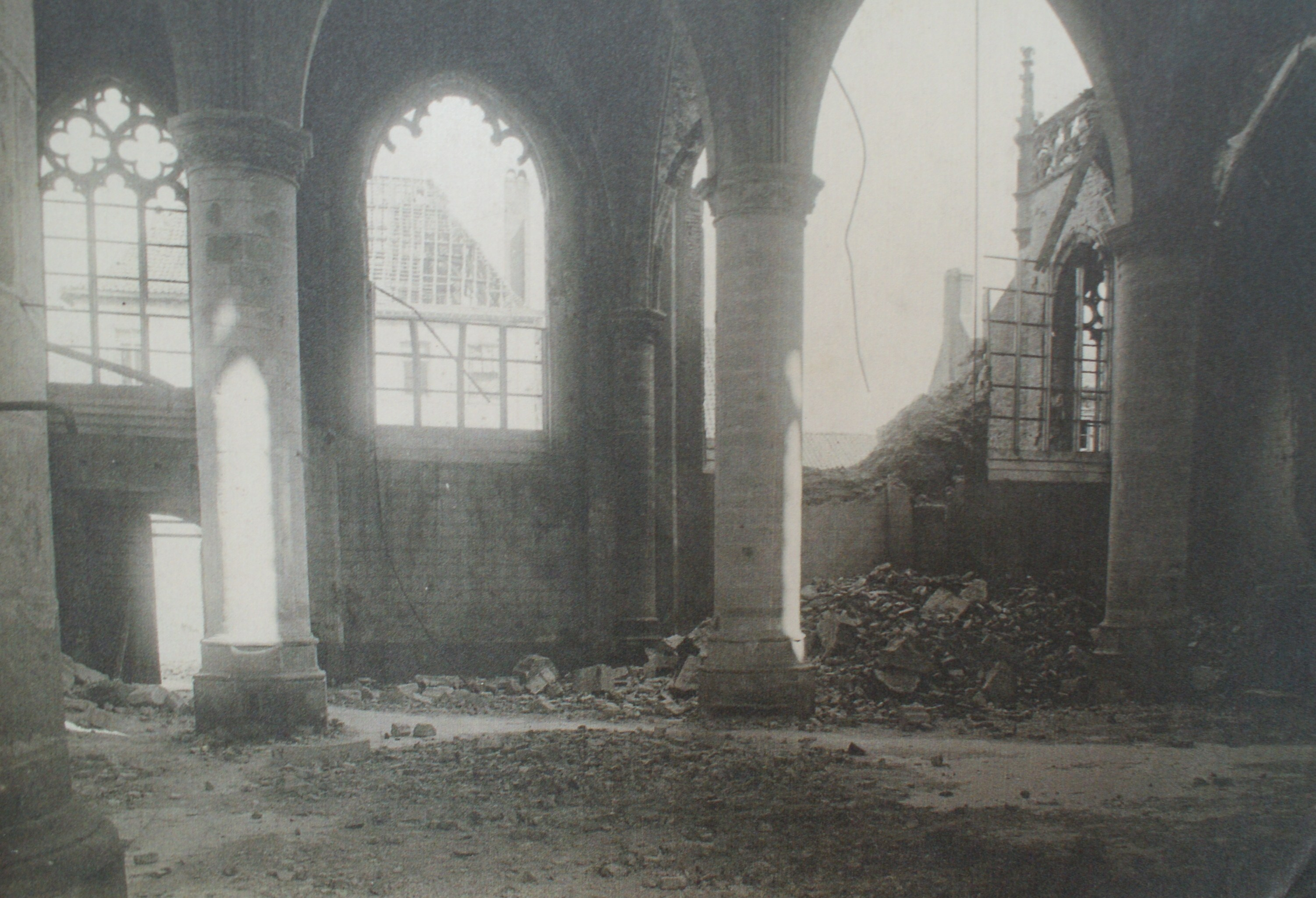 Het interieur van de St Medarduskerk in Wervik. De kerk is zwaar beschadigd door Engelse bommen in 1917.